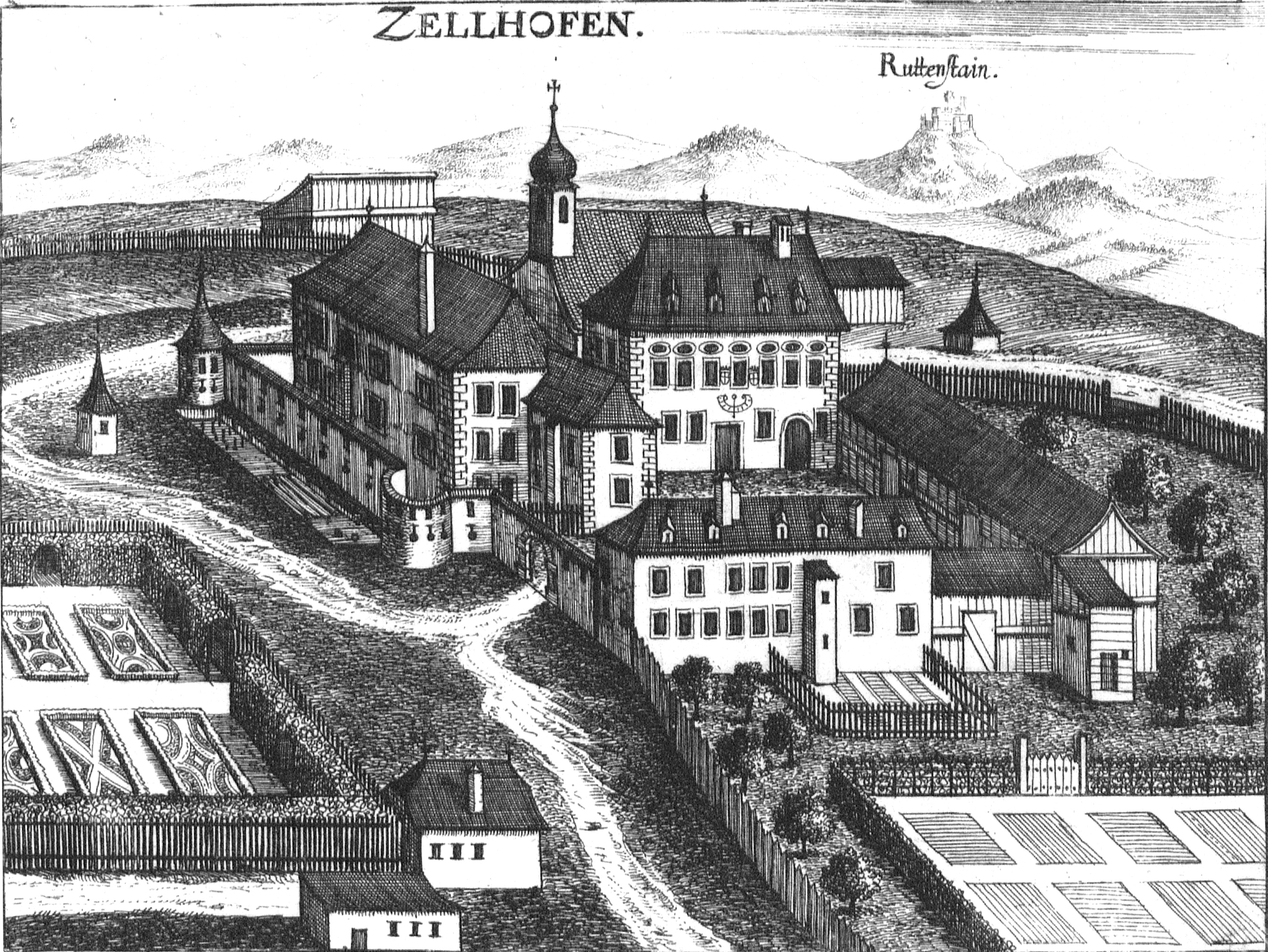 Schloss Zellhof nach Vischer